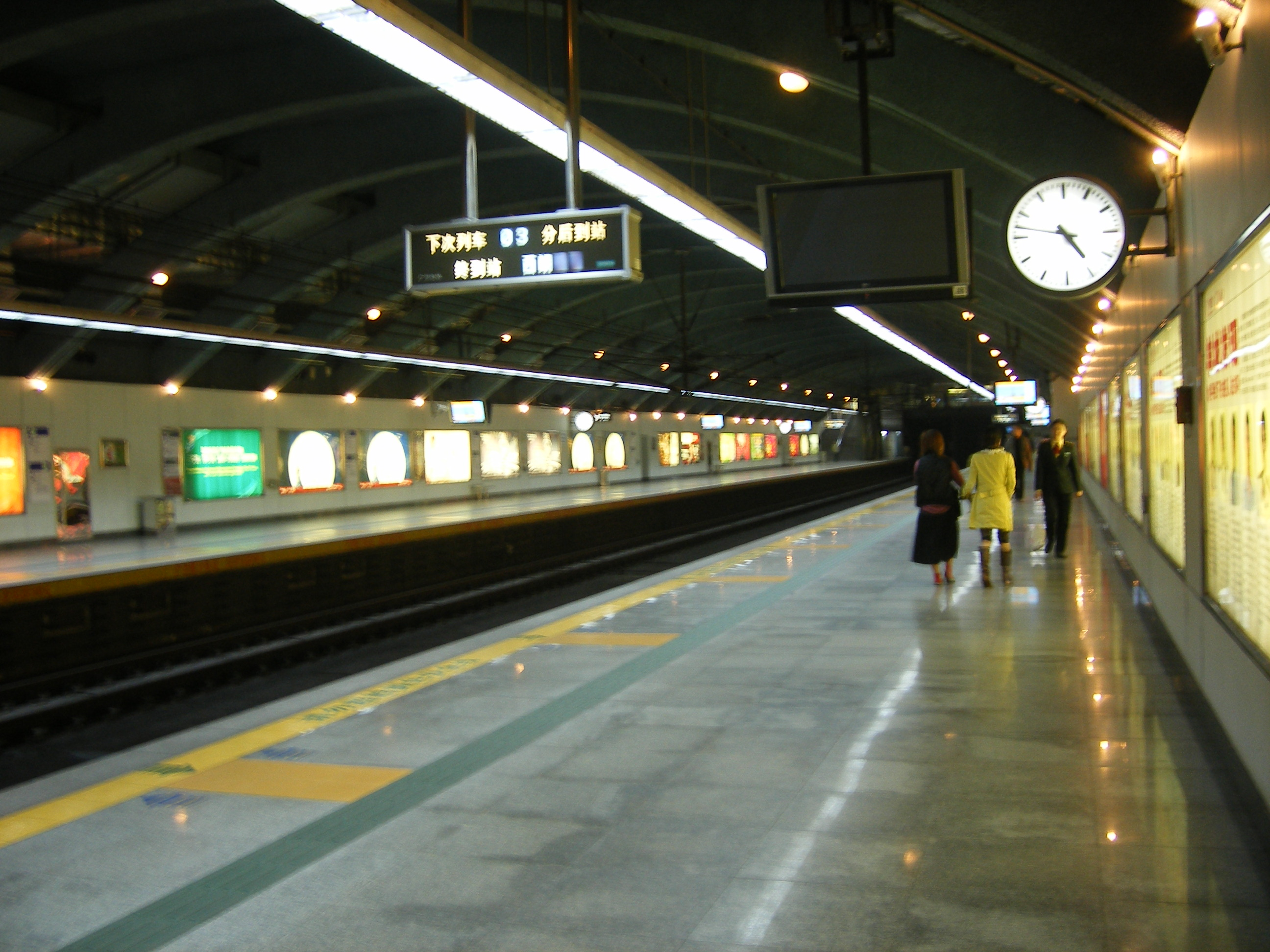 广州地铁花地湾站站台。